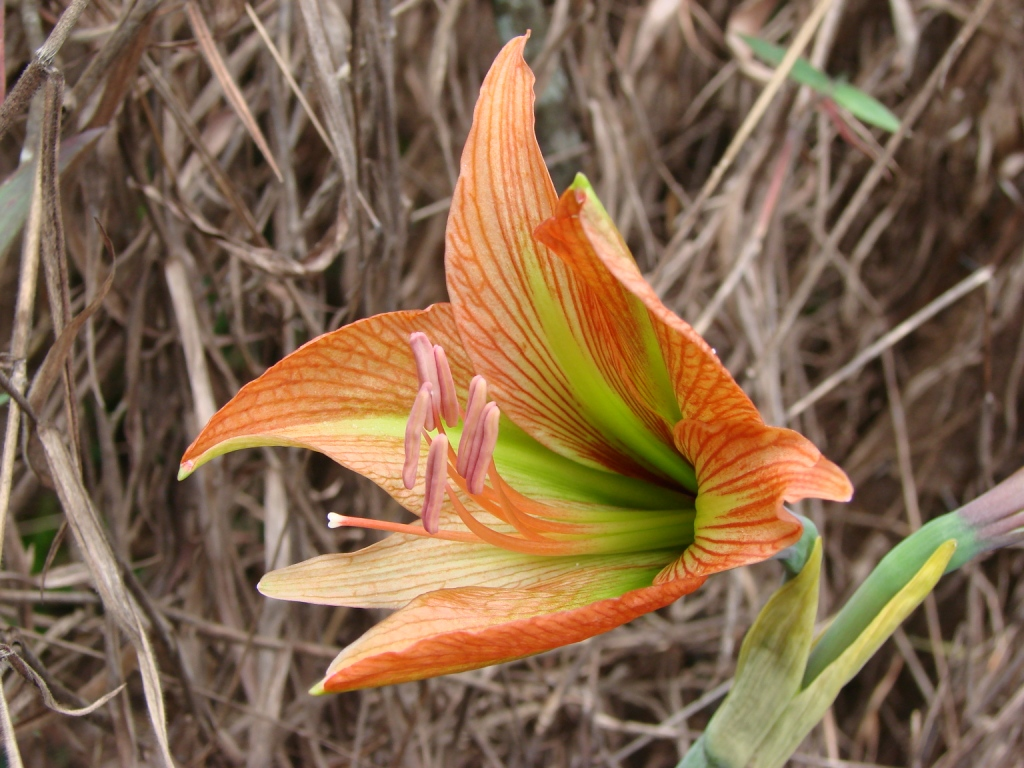 Hippeastrum puniceum (Lam.) Kuntze - AMARYLLIDACEAE - Parque Olhos D'Água - Brasília - Distrito Federal - Brasil.